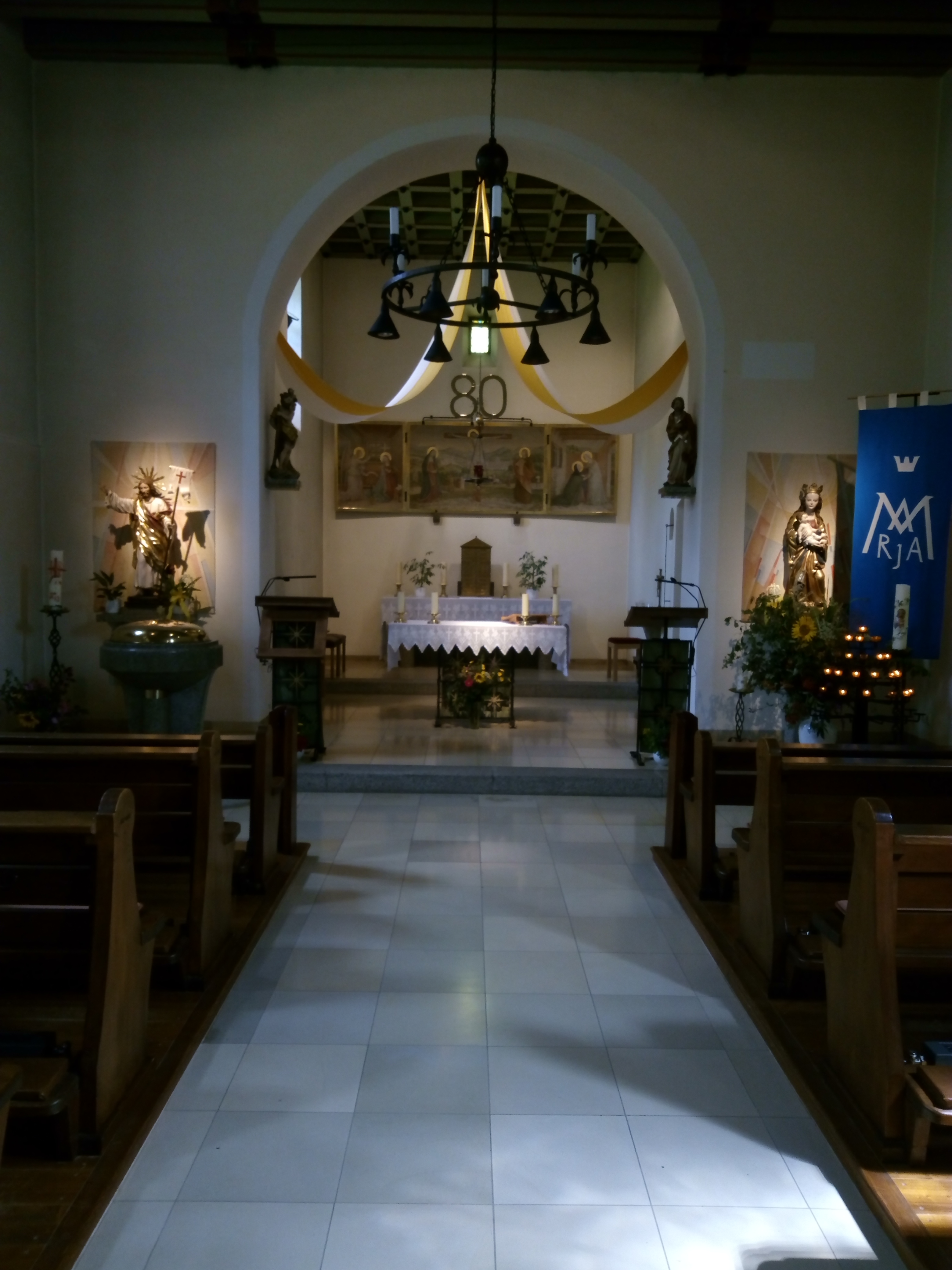 Maria Immaculata (Weißenstadt), Innenraum